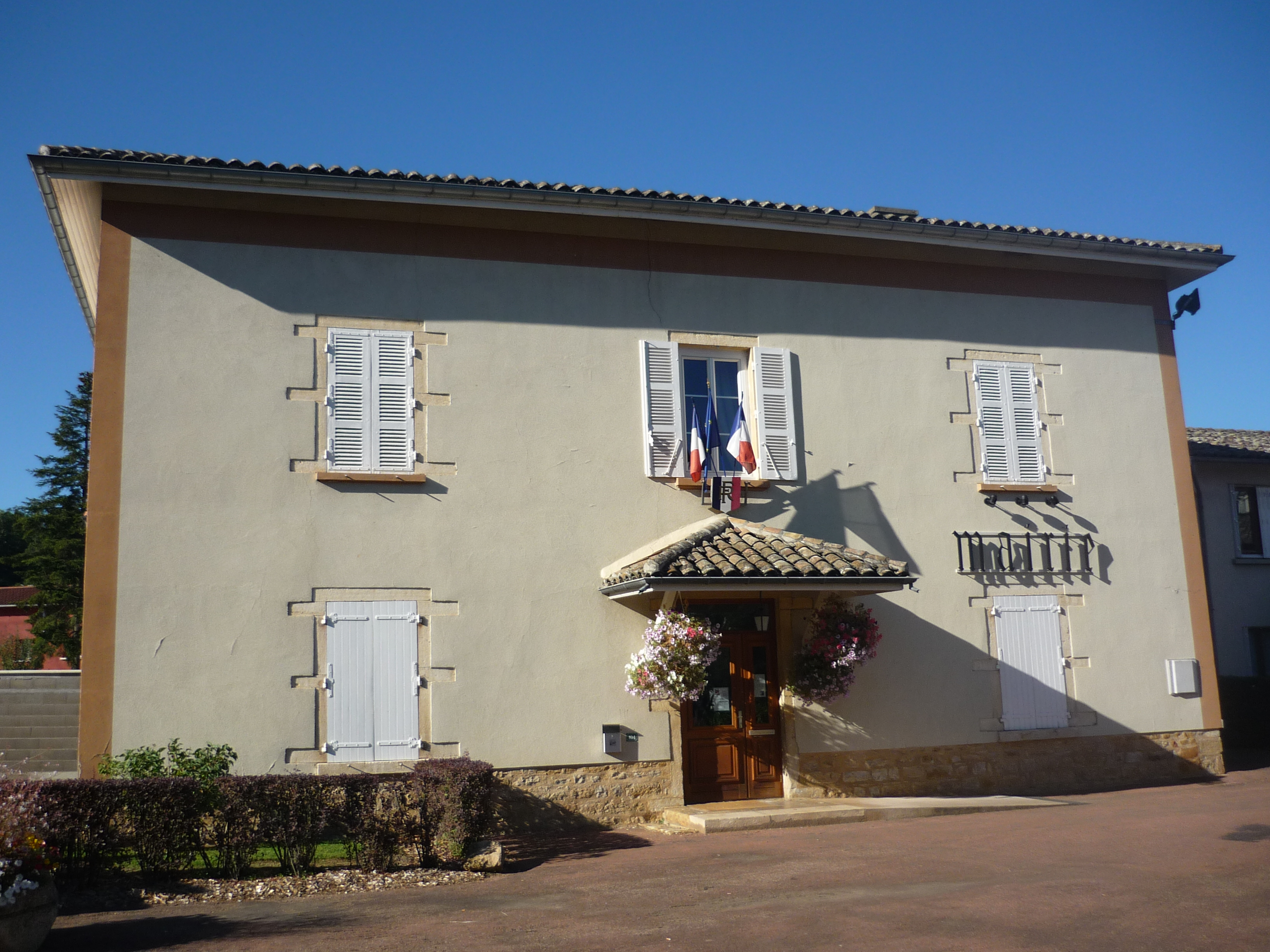 Mairie de la commune de Frans dans le département de l'Ain